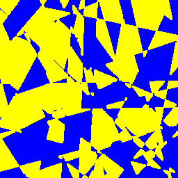 Mosaique de Poisson biphasée (bleue et jaune)